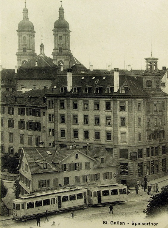 Die Trogenerbahn beim Spisertor in St. Gallen. Das kleine Gebäude wurde später aus Platzgründen abgebrochen